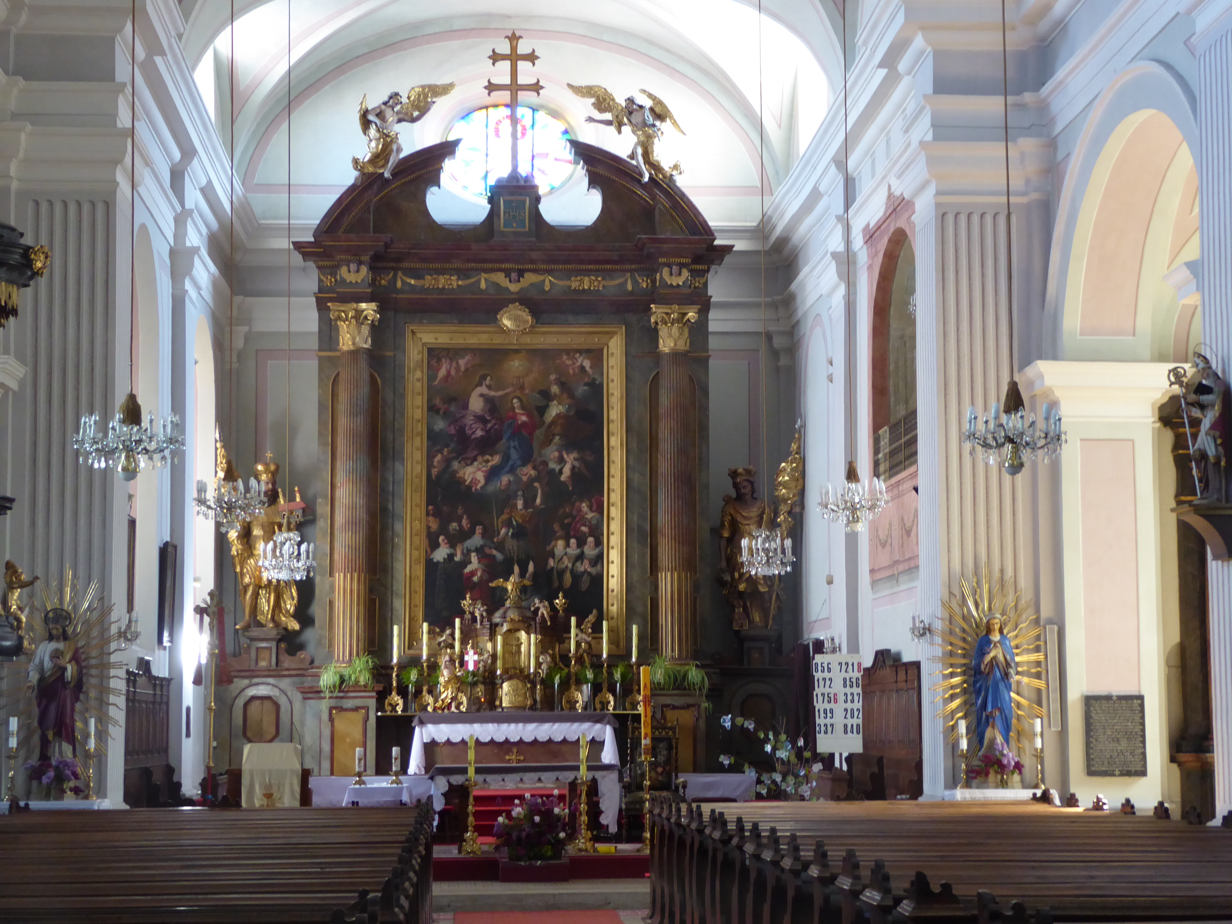 Pfarrkirche Mariae Himmelfahrt, Straß im Straßertale, Niederösterreich